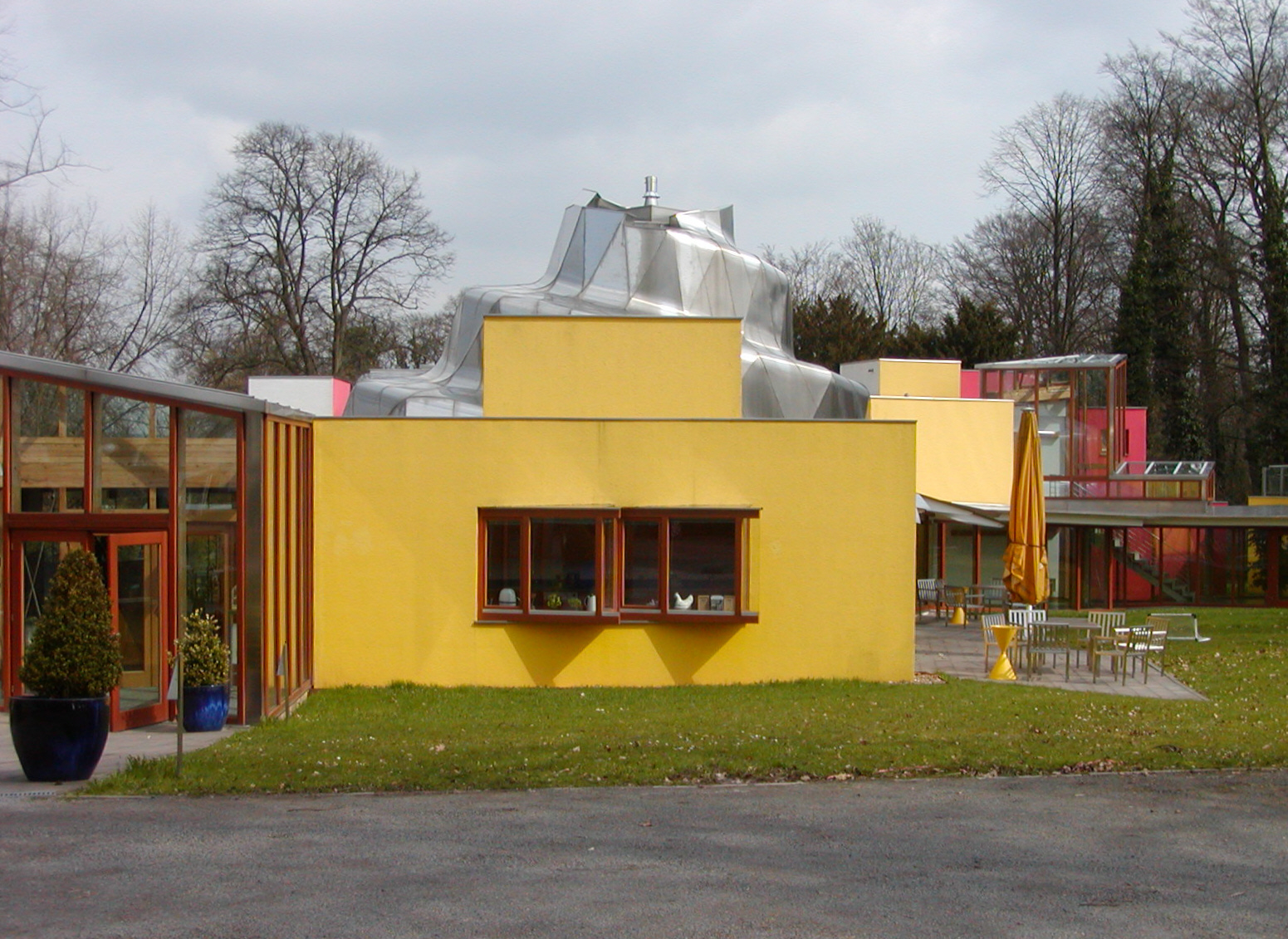 RonaldMcDonald-Haus Bad Oeynhausen Sonstiges